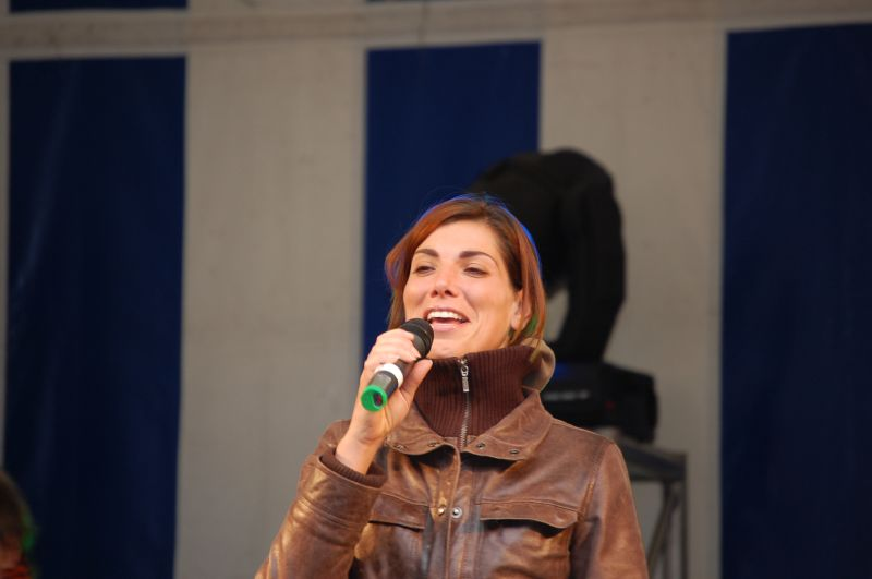 Saartje Vanden Driessche